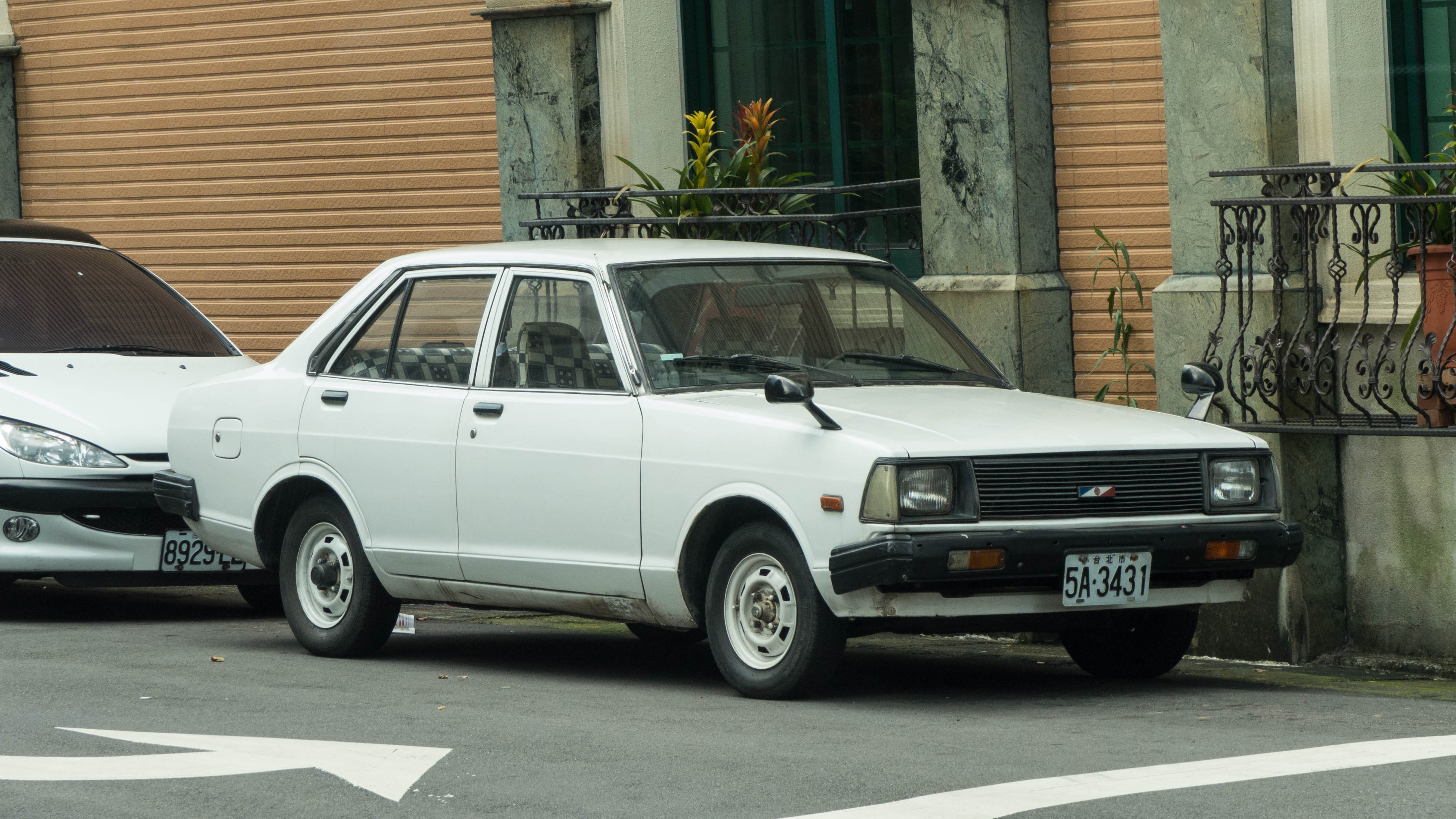 中文（台灣）: 裕隆速利303 1.2GL轎車後期型，車號5A-3431，攝於行駛臺北市松山區長春路的臺北市聯營公車12路公車上。